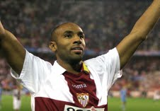 Kanoute, delantero de Sevilla FC